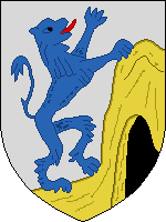 Герб города Петсери 1937 года, Эстония(ранее и ныне Печоры, Псковская область)